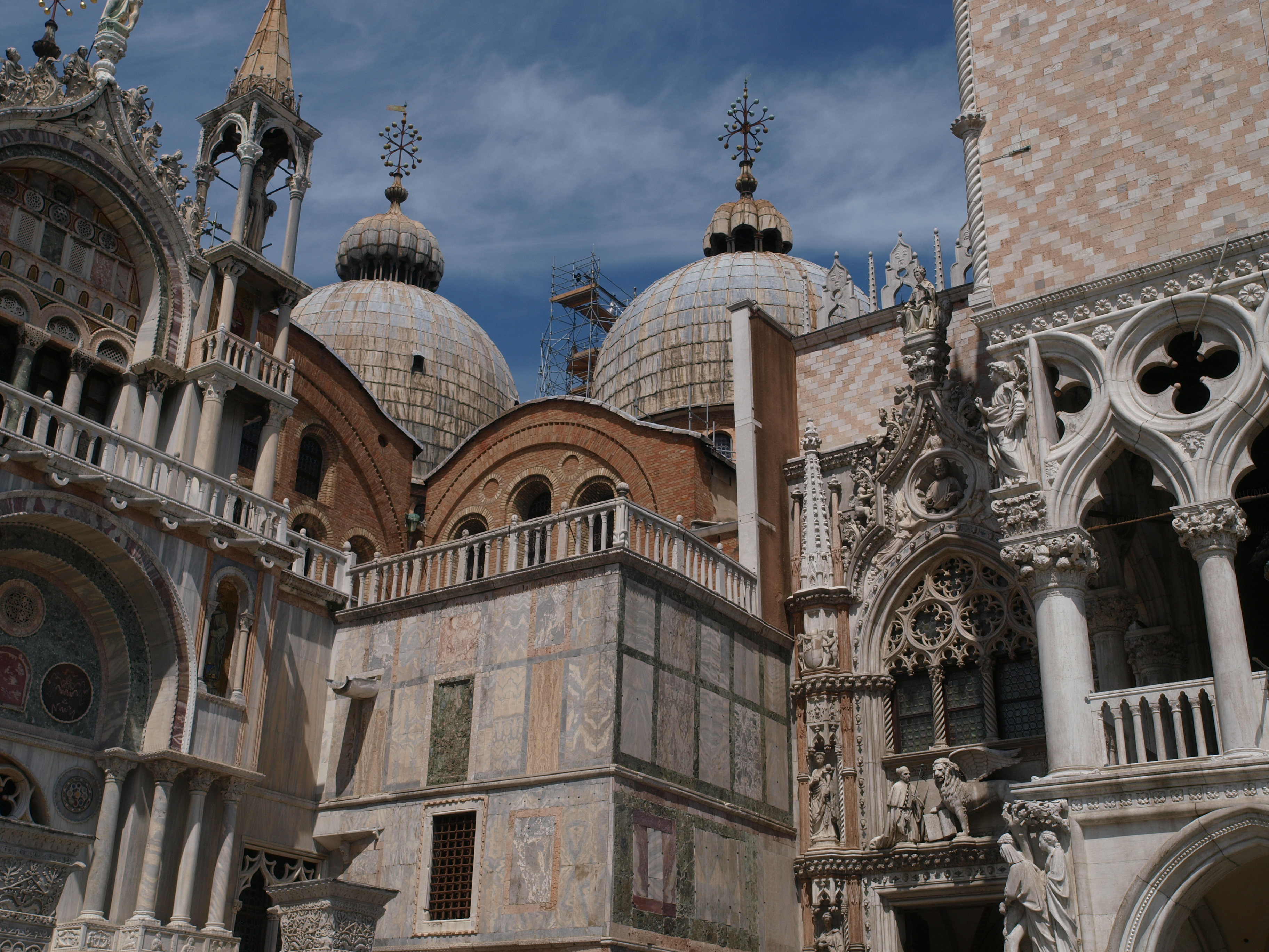 Venezia , Veneto